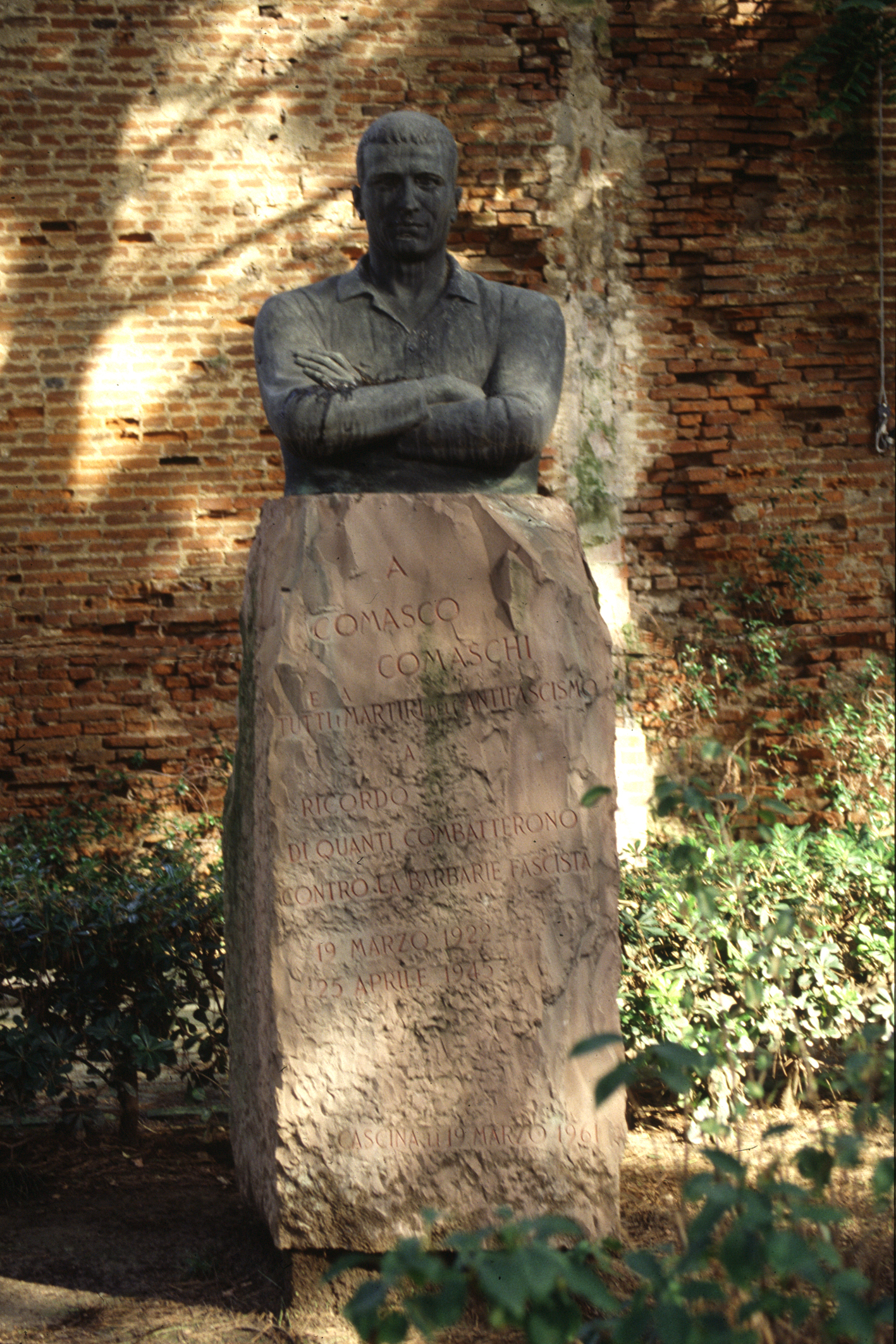 Statua a Comasco Comaschi (martire antifascista) This is a photo of a monument which is part of cultural heritage of Italy.